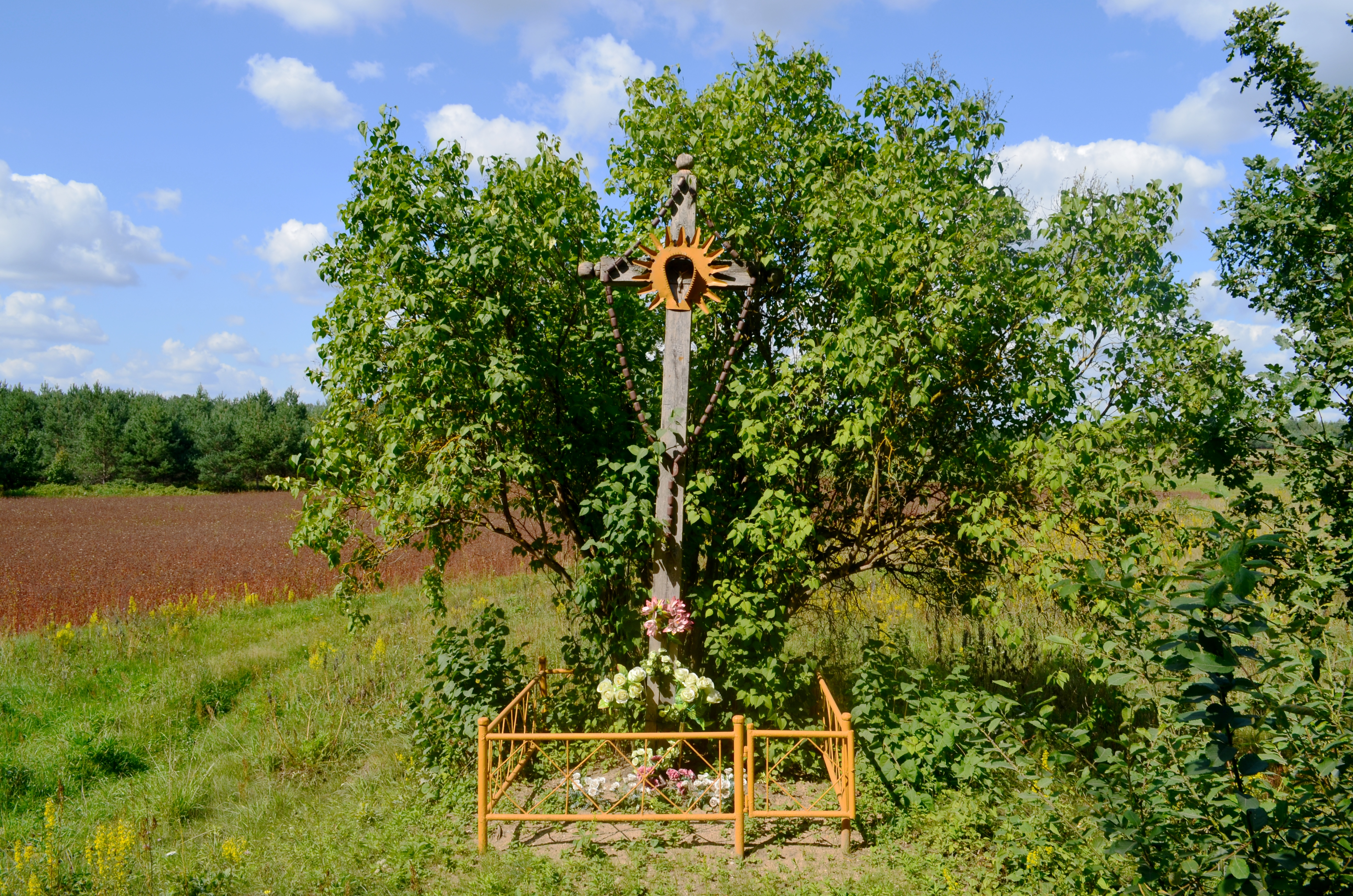 Paginų kryžius, Šalčininkų raj.